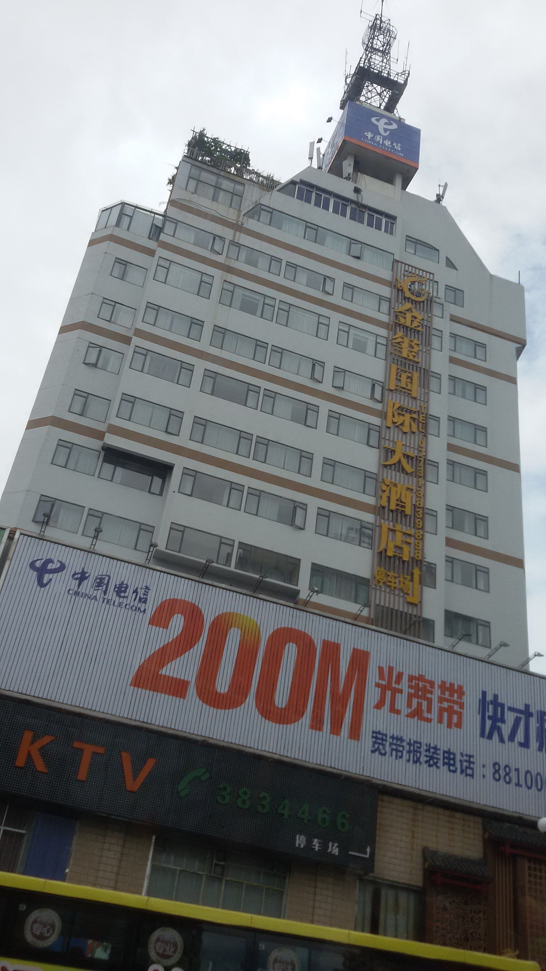 粵語: 金璽國際大酒店